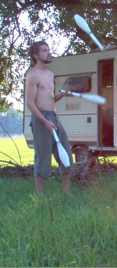 Jonglage trois quilles. Photo personnelle de Djapipol.